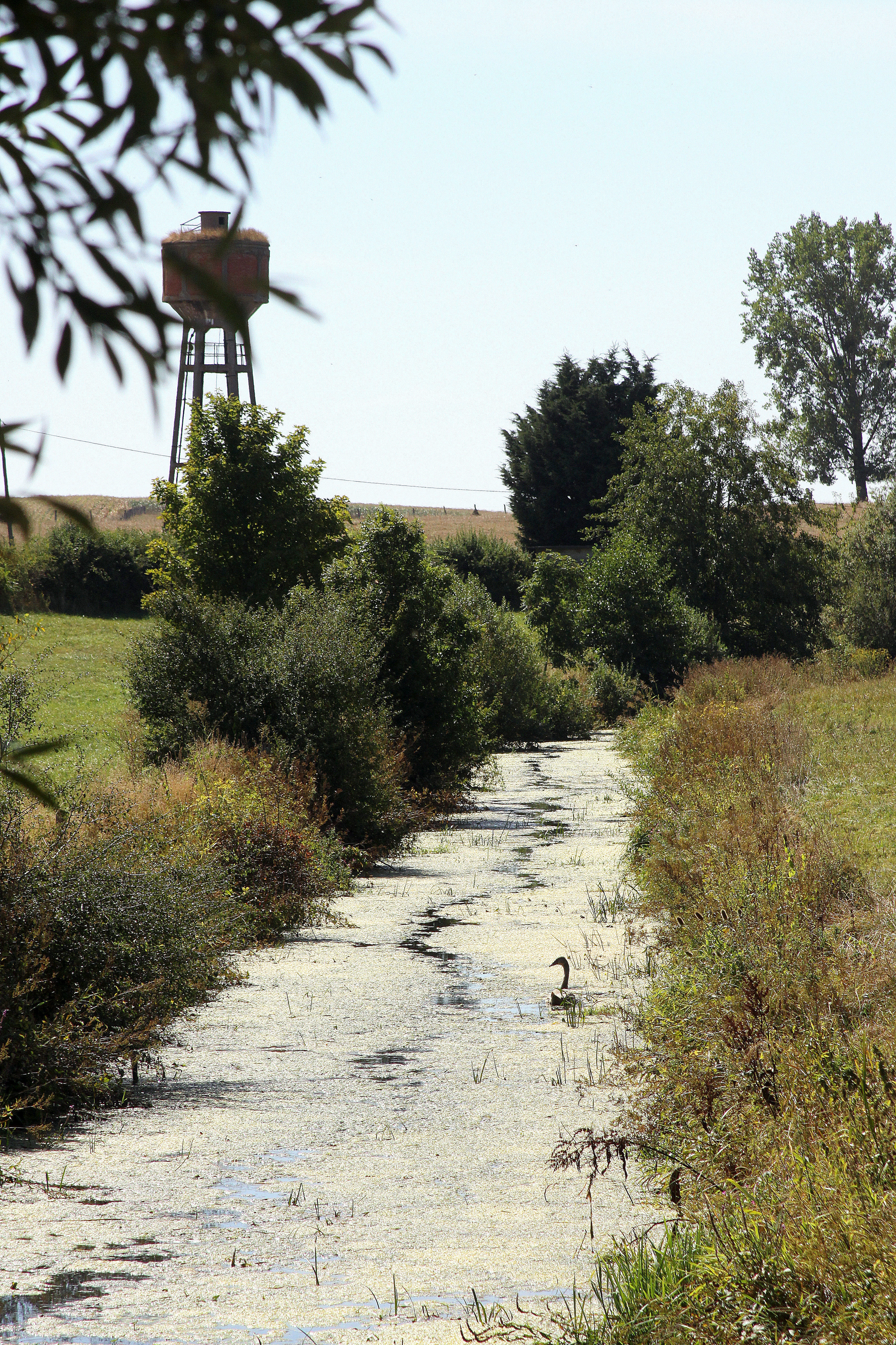 De Rupt de Mad zu Lahayville flossop gesinn